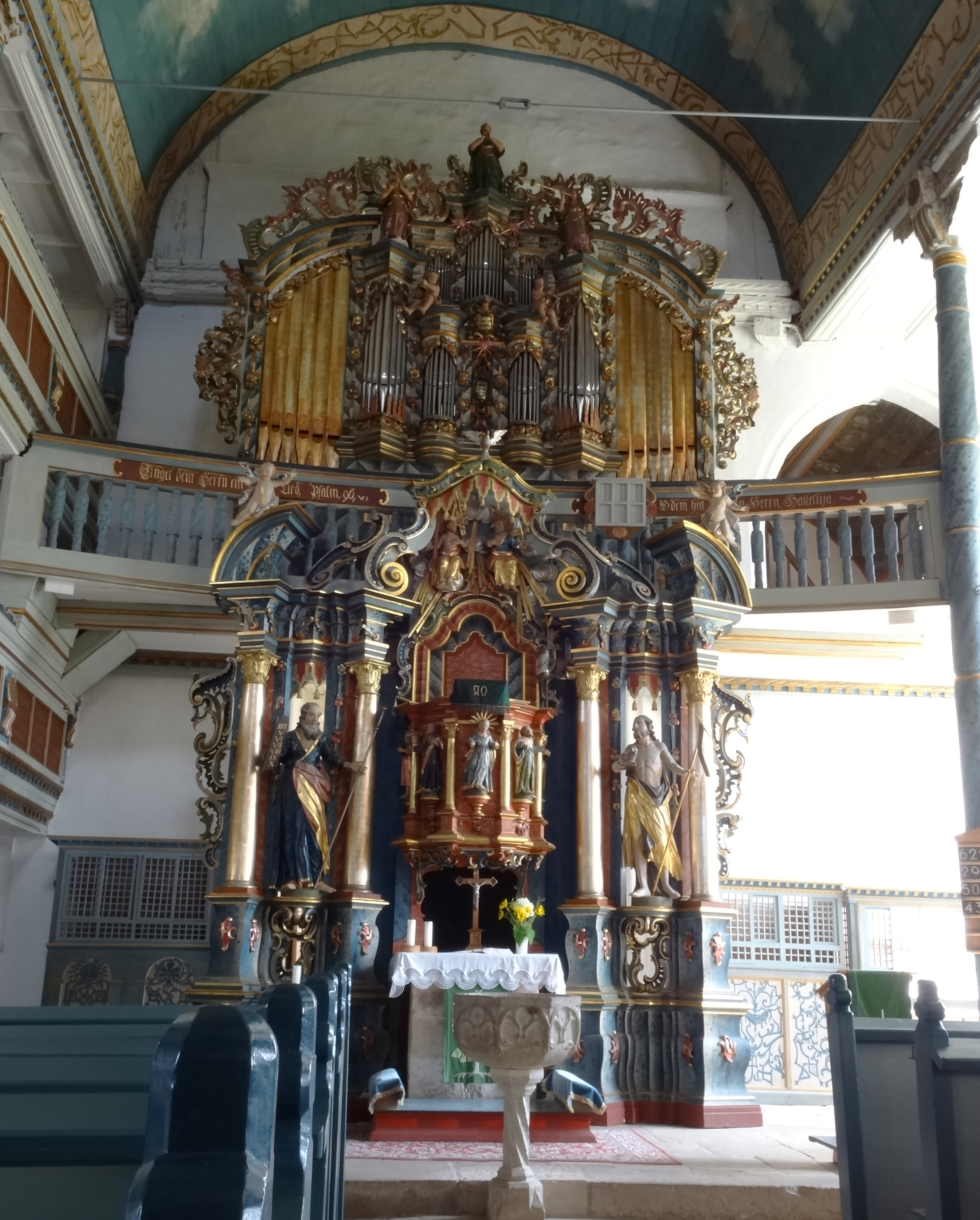 Der Kanzelaltar von 1775 bildet mit der darüber befindlichen Orgel ein Ensemble. Die Figuren an der Kanzel stellen die vier Evangelisten mit Christus in der Mitte dar, darüber thronen Gott Vater, Sohn und Heiliger Geist , als Taube. Den Altar flankieren die lebensgroßen Figuren des Mose und Johannes des Täufers.